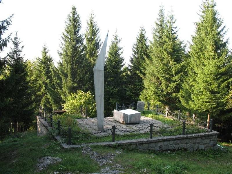 Kosturnica je spomenik palim borcima NOR-a